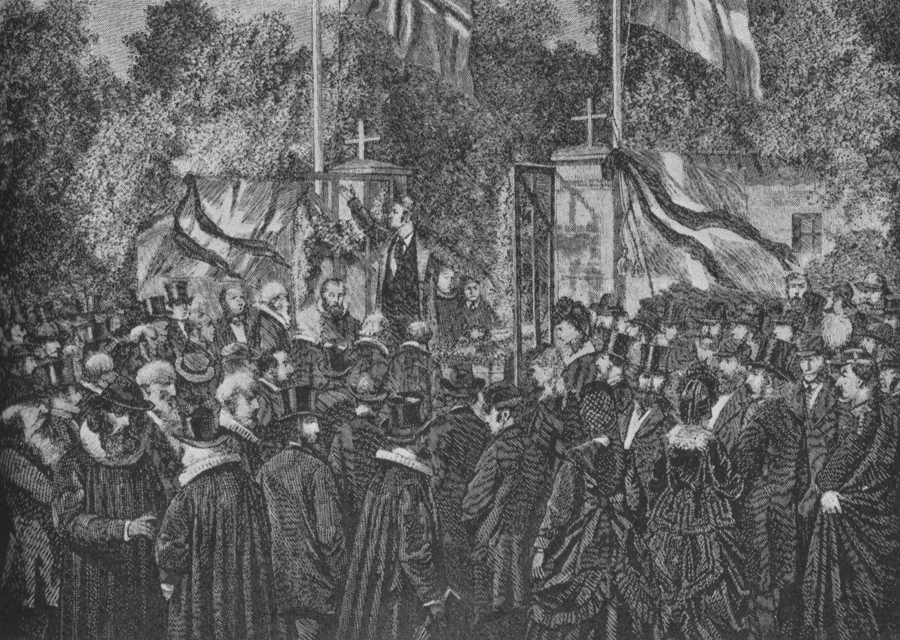 Bjørnstjerne Bjørnson taler ved Nikolaj Frederik Severin Grundtvigs begravelse 1872. Xylografi av Bernhard Olsen.